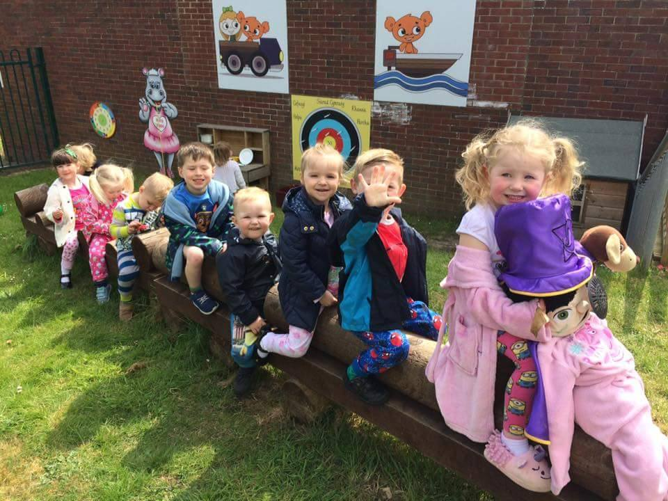 Ein hoff lun! Cylch meithrin Treffynnon